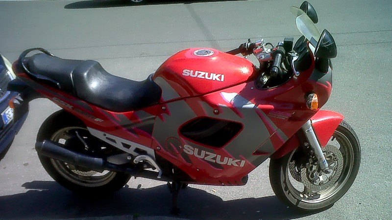 Suzuki GSX600 F (GN72A) del 1992